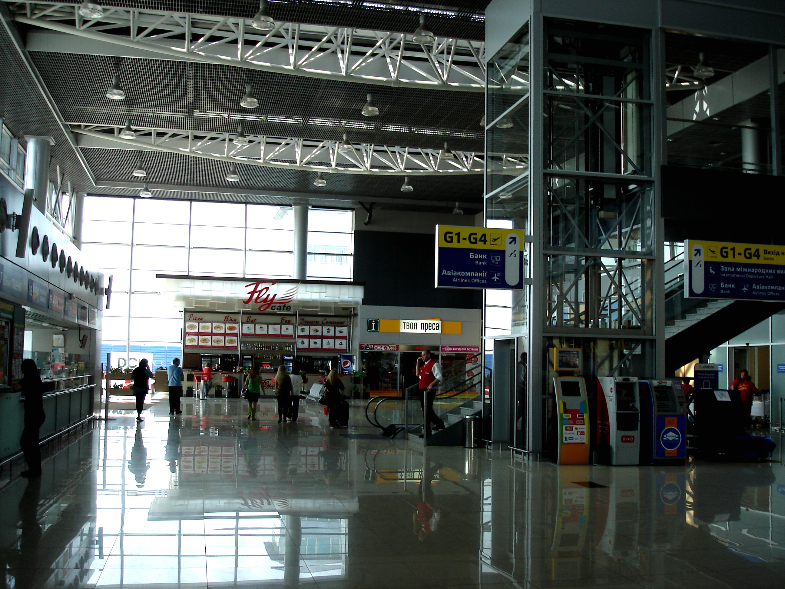 Міжнародний аеропорт «Харків». Пасажирський термінал. Внутрішній інтер’єр.